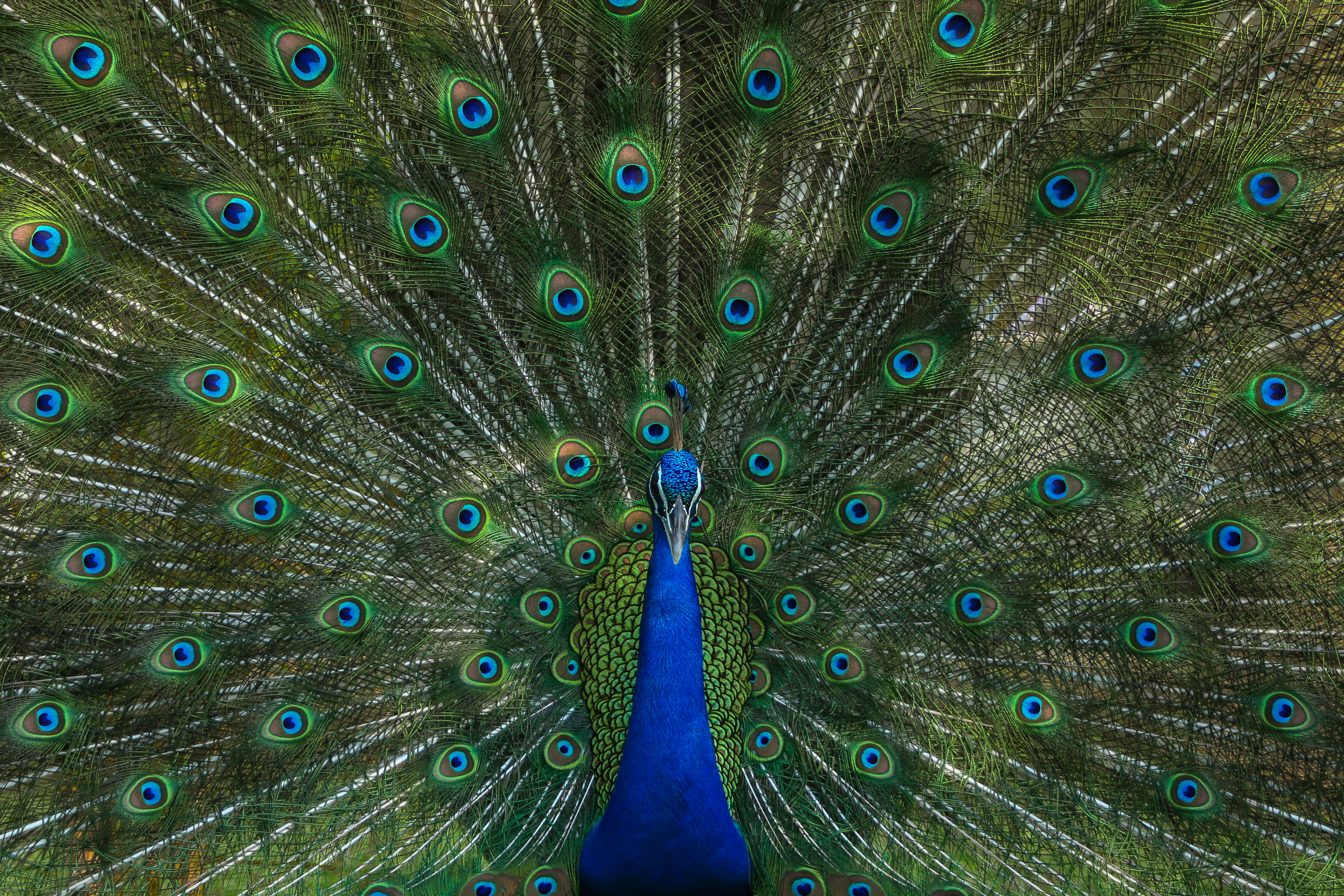 বঙ্গবন্ধু শেখ মুজিব সাফারি পার্ক